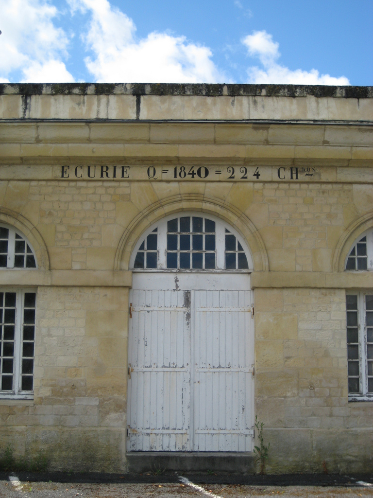 Grande écurie du Quartier Lorge à Caen